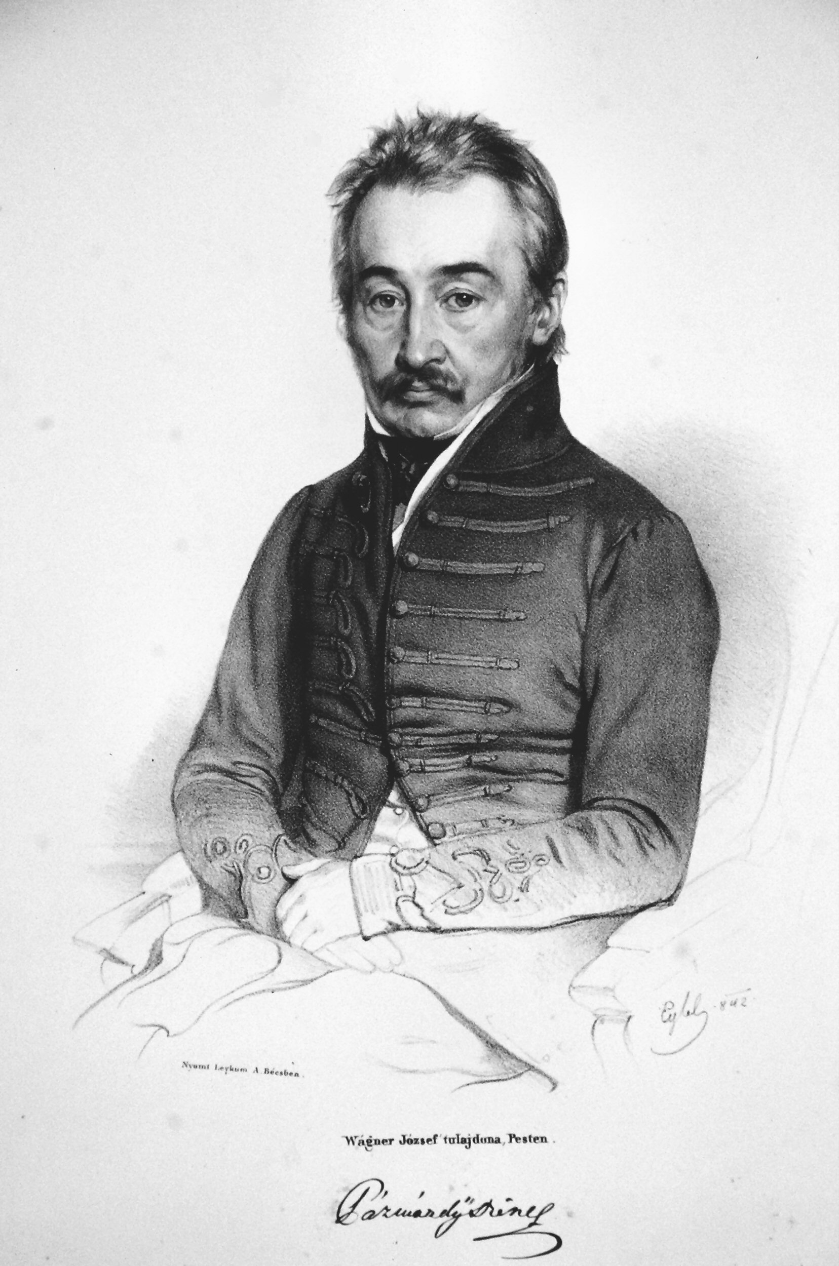 Jophann Baptist Passini (1798-1874), österreichischer Maler, Kupferstecher, Lithograph. Lithographie von Franz Eybl, 1845